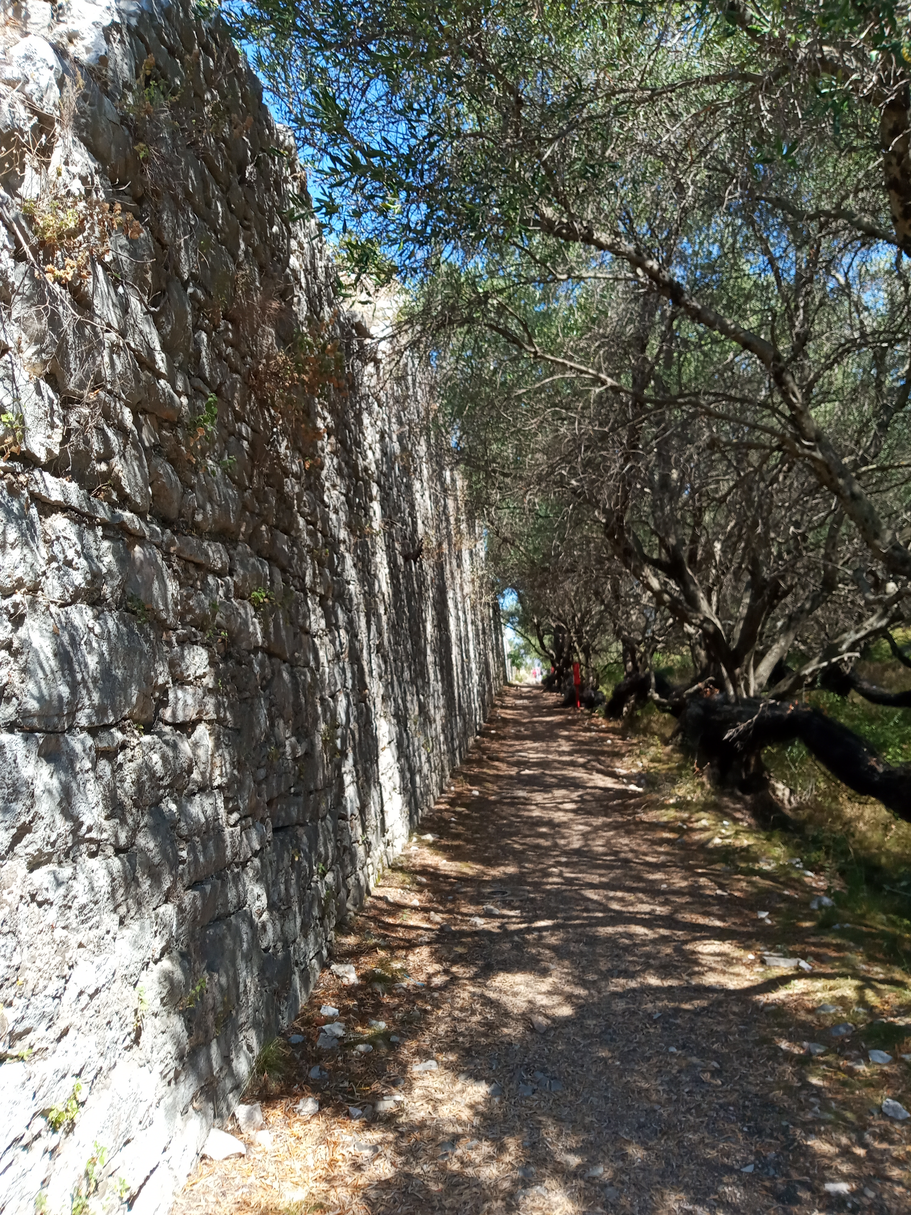 замок Кассіопі, Греція, Керкіра (Корфу)